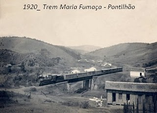 Trem Maria Fumaça passando sobre o pontilhão no bairro Luanda em Alto Jequitibá (MG)